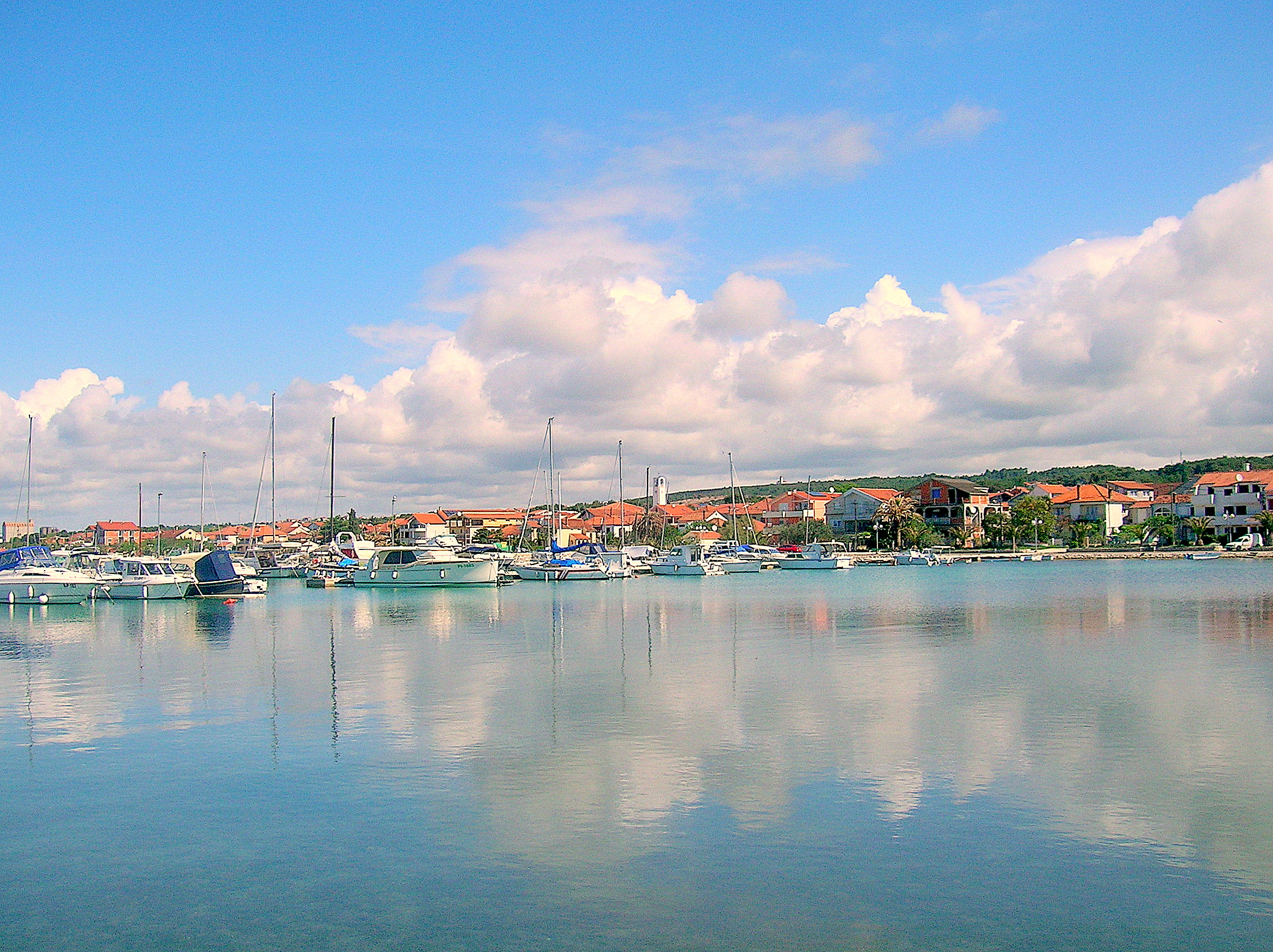 Vue du petit port de Bibinje